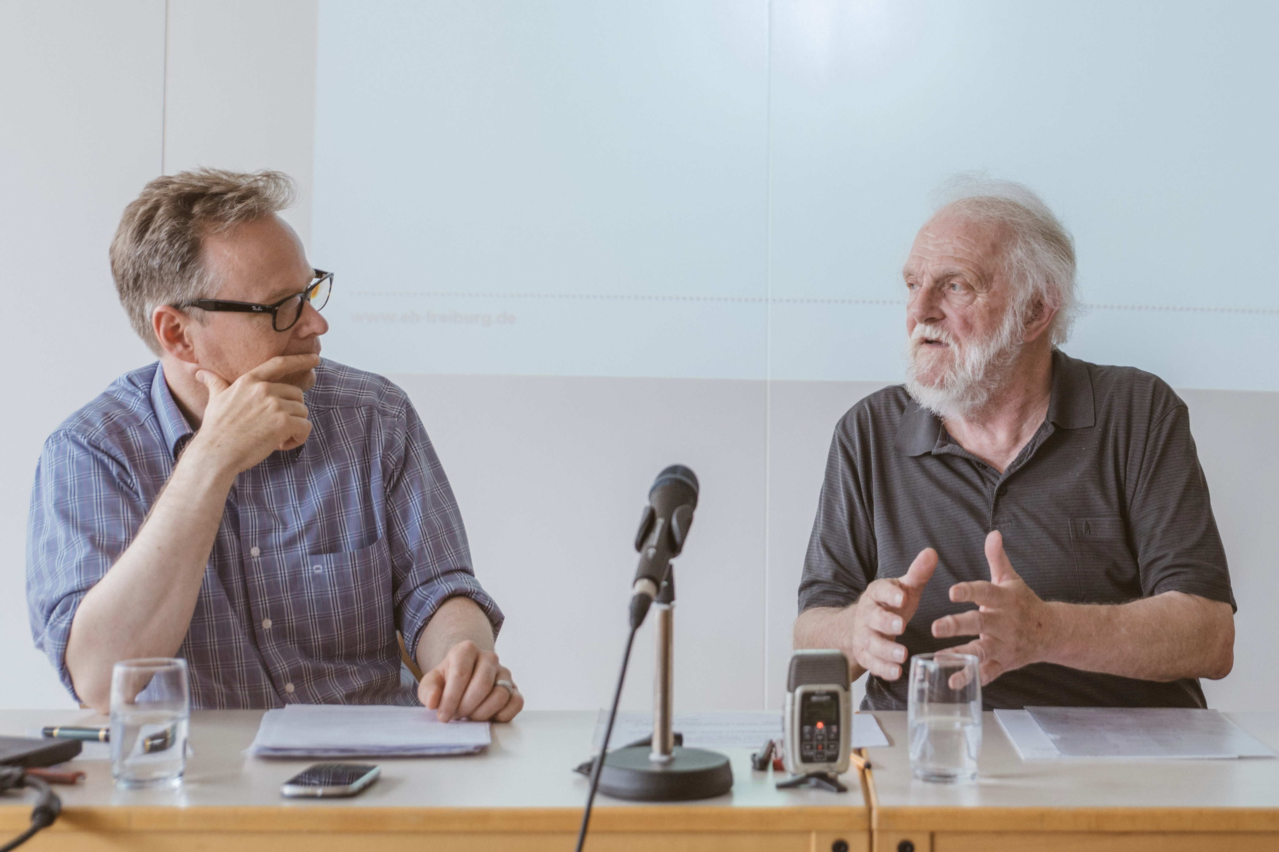 Hans Thiersch und Björn Kraus während einer gemeinsamen Veranstaltungen zu Fragen der Normativität in Wissenschaft und Praxis der Sozialen Arbeit